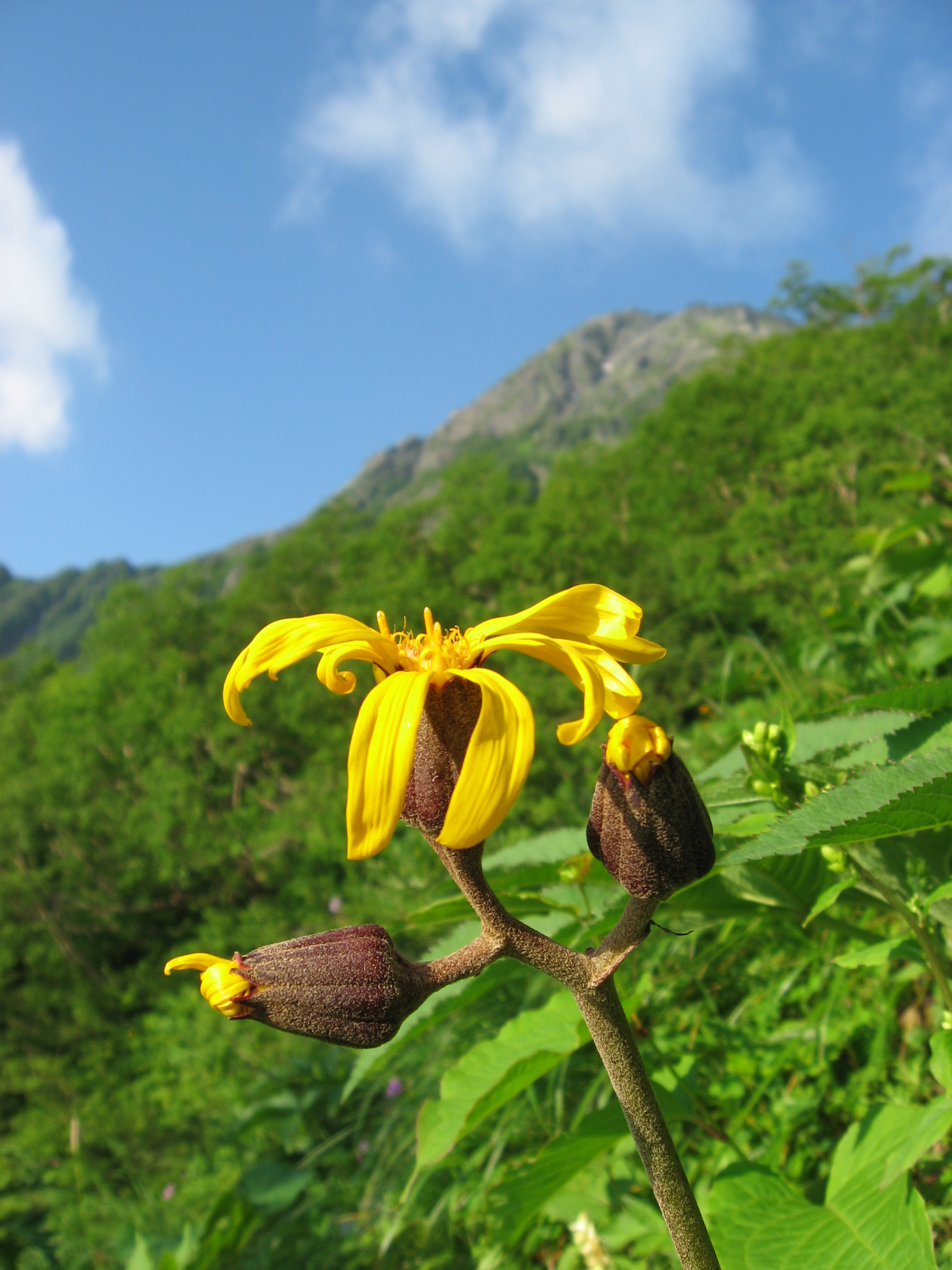 マルバダケブキと北岳